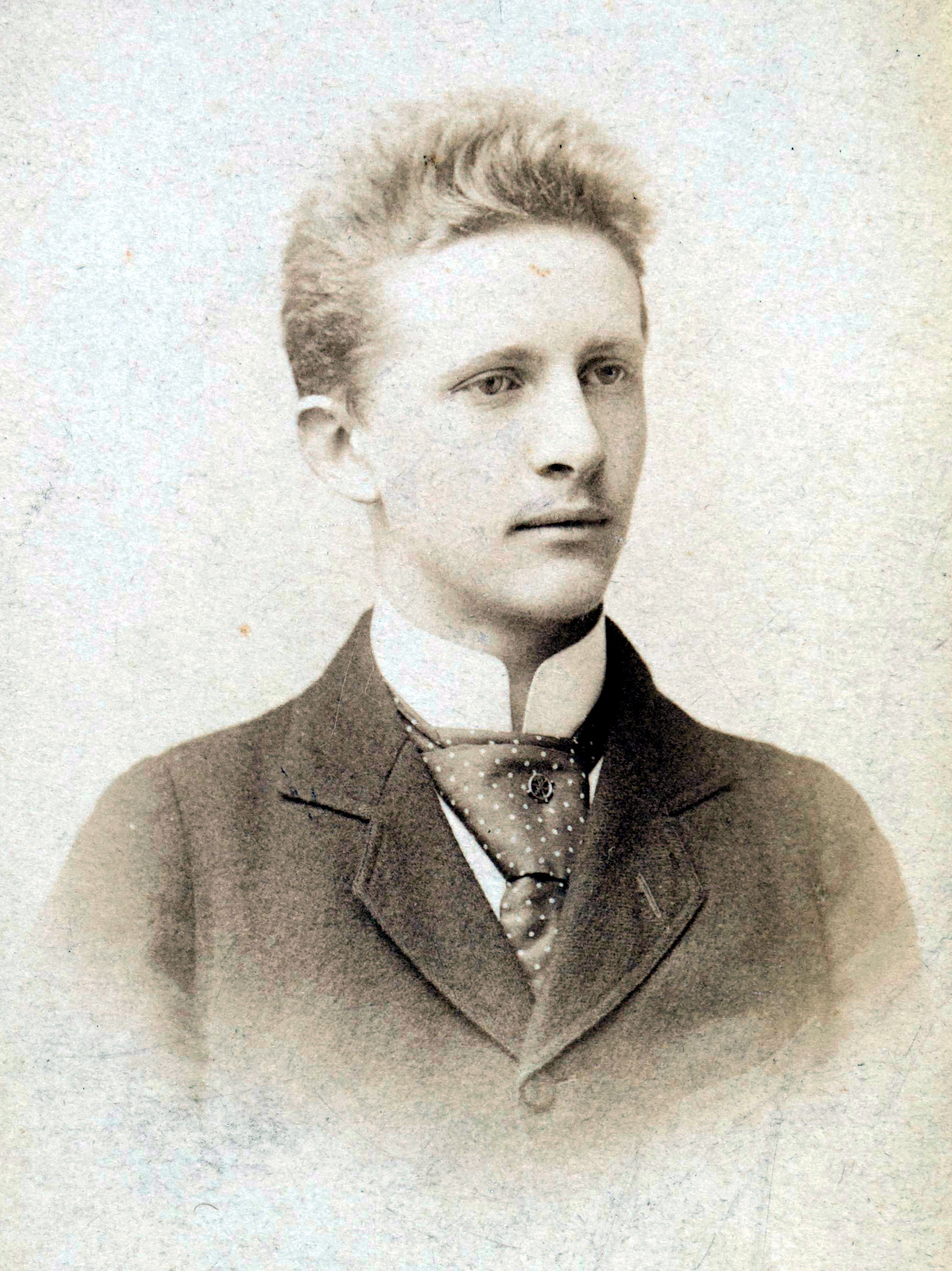 Ludwik Puget, ok. 1897 r.